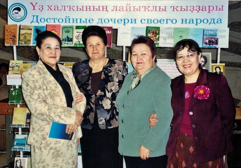 Ф. Хисамитдинова, Г. Ситдиҡова, Р. Ҡунаҡова, Г. Ҡазбулатова